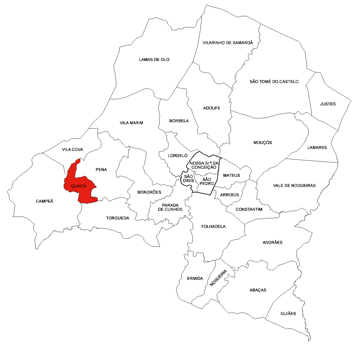 Freguesia de Quintã (concelho de Vila Real)